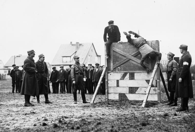 Oranienburg, Konzentrationslager Zentralbild 1933 wurden nach der Machtergreifung durch die faschistischen Nationalsozialisten in Deutschland die Konzentrationslager für politische Gegner errichtet. Häftlinge im KZ-Oranienburg bei sogenannten "sportlichen Übungen".